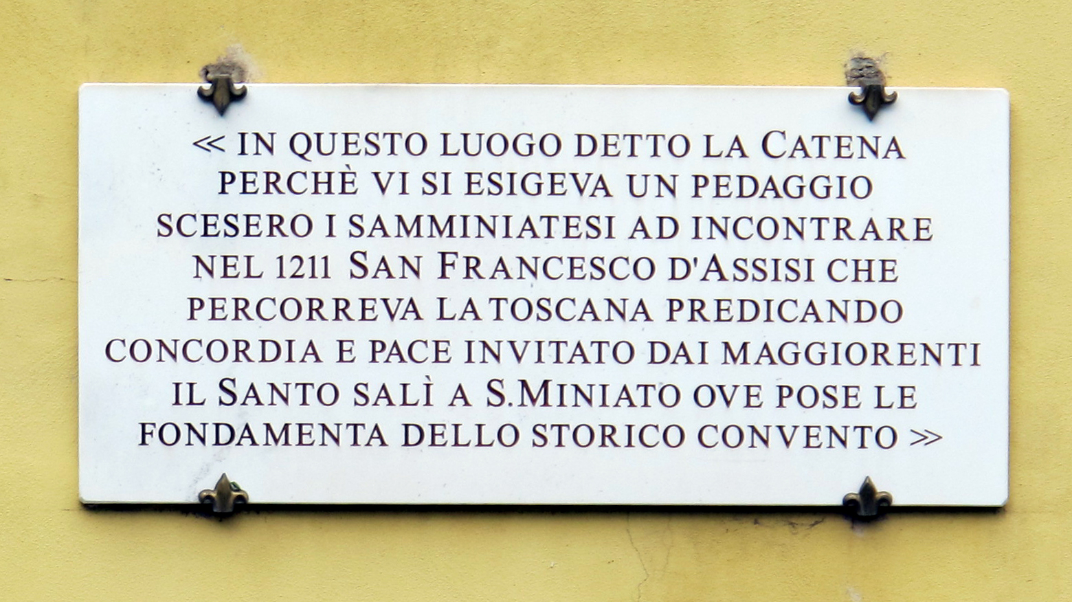 chiese di San Miniato